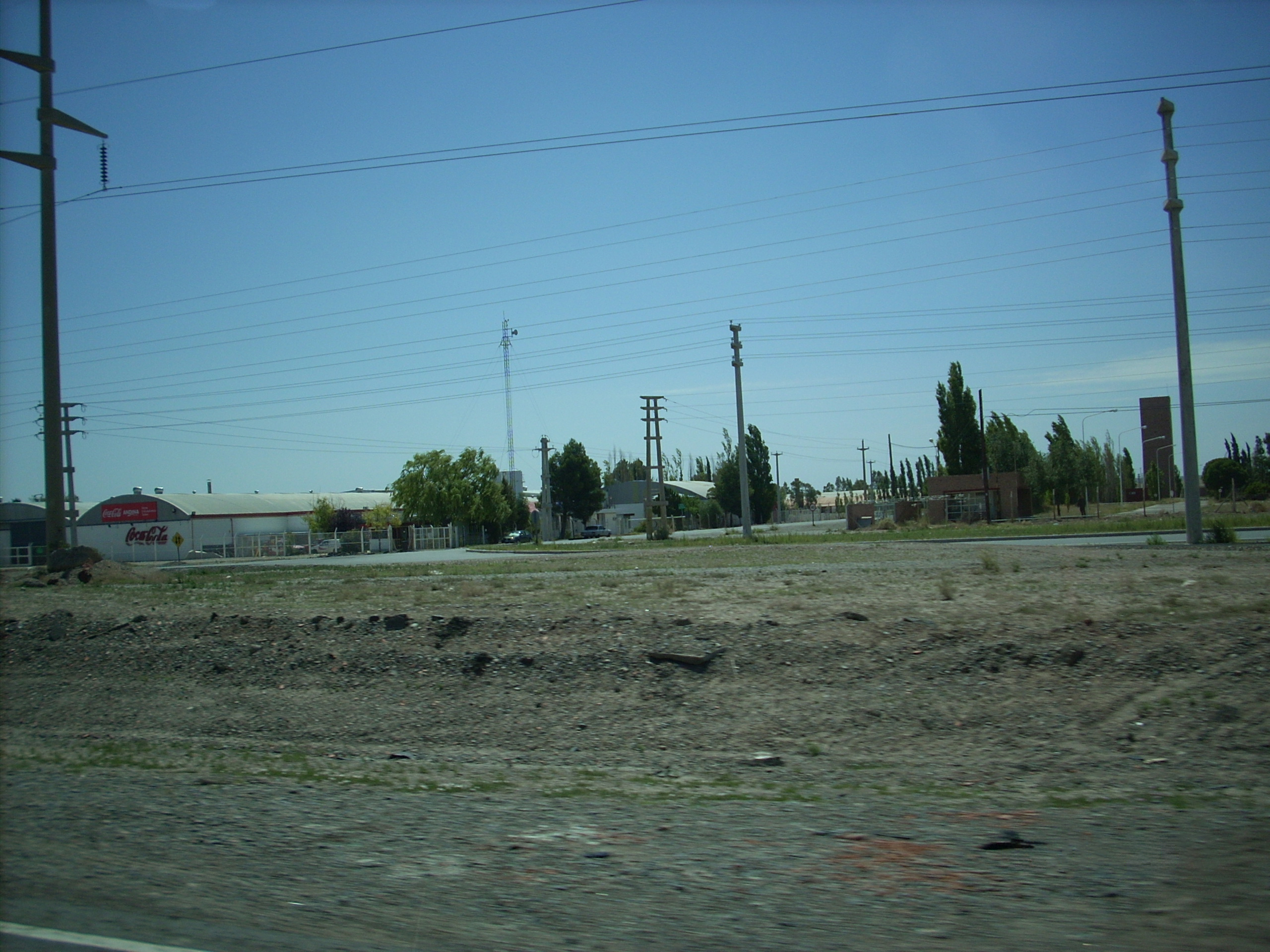 Vista del Parque Industrial de Trelew desde la ruta 25